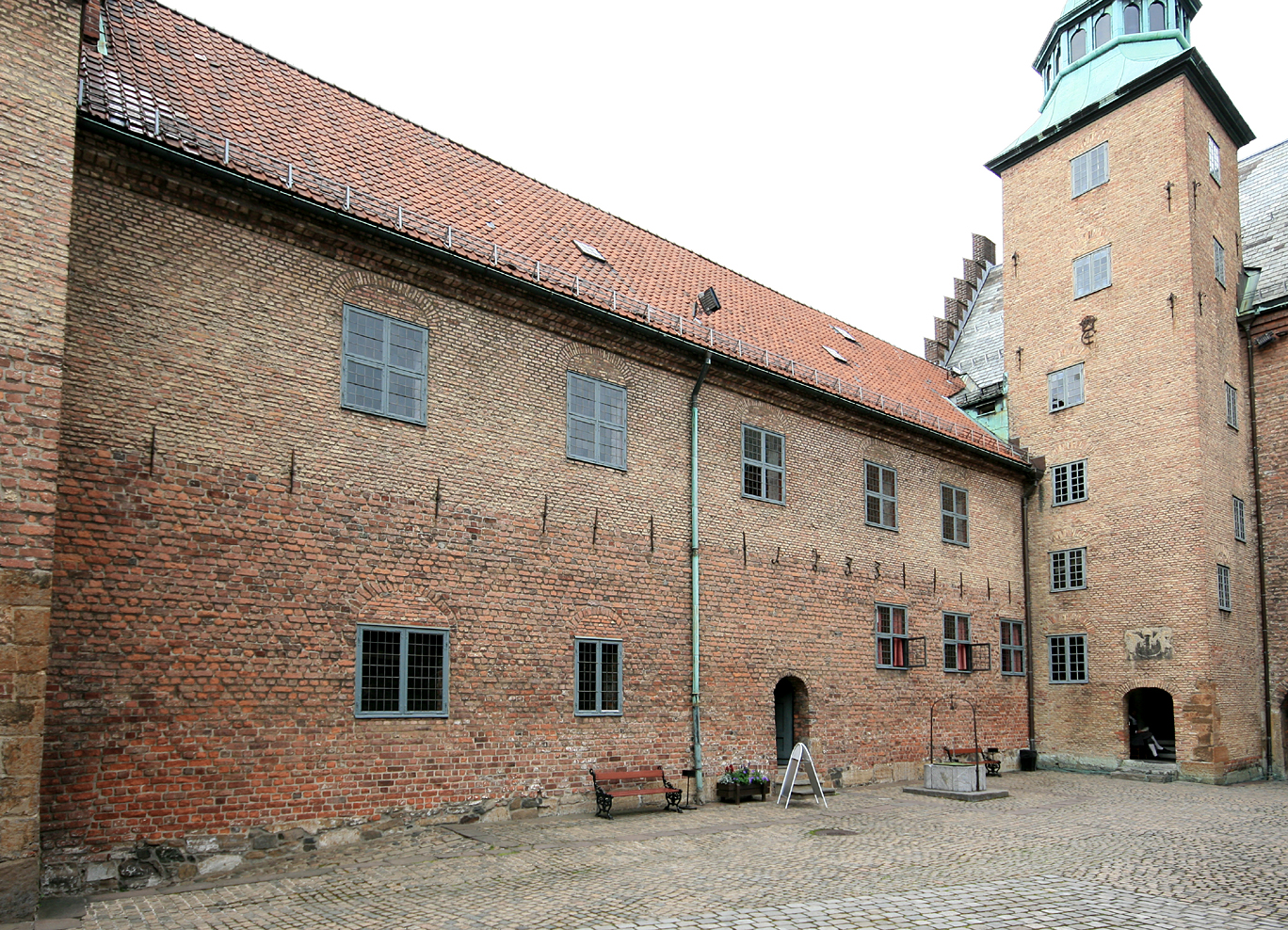 Romeriksfløyen, Akershus festning, Oslo. Eldste del bygd ca. 1300; ombygd og påbygd 1633. Her holdt Riksarkivet til på den tida Henrik Wergeland var riksarkivar.